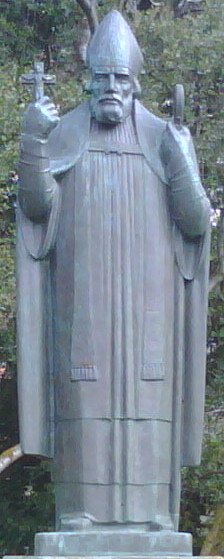 pomnik biskupa Jona Arasona